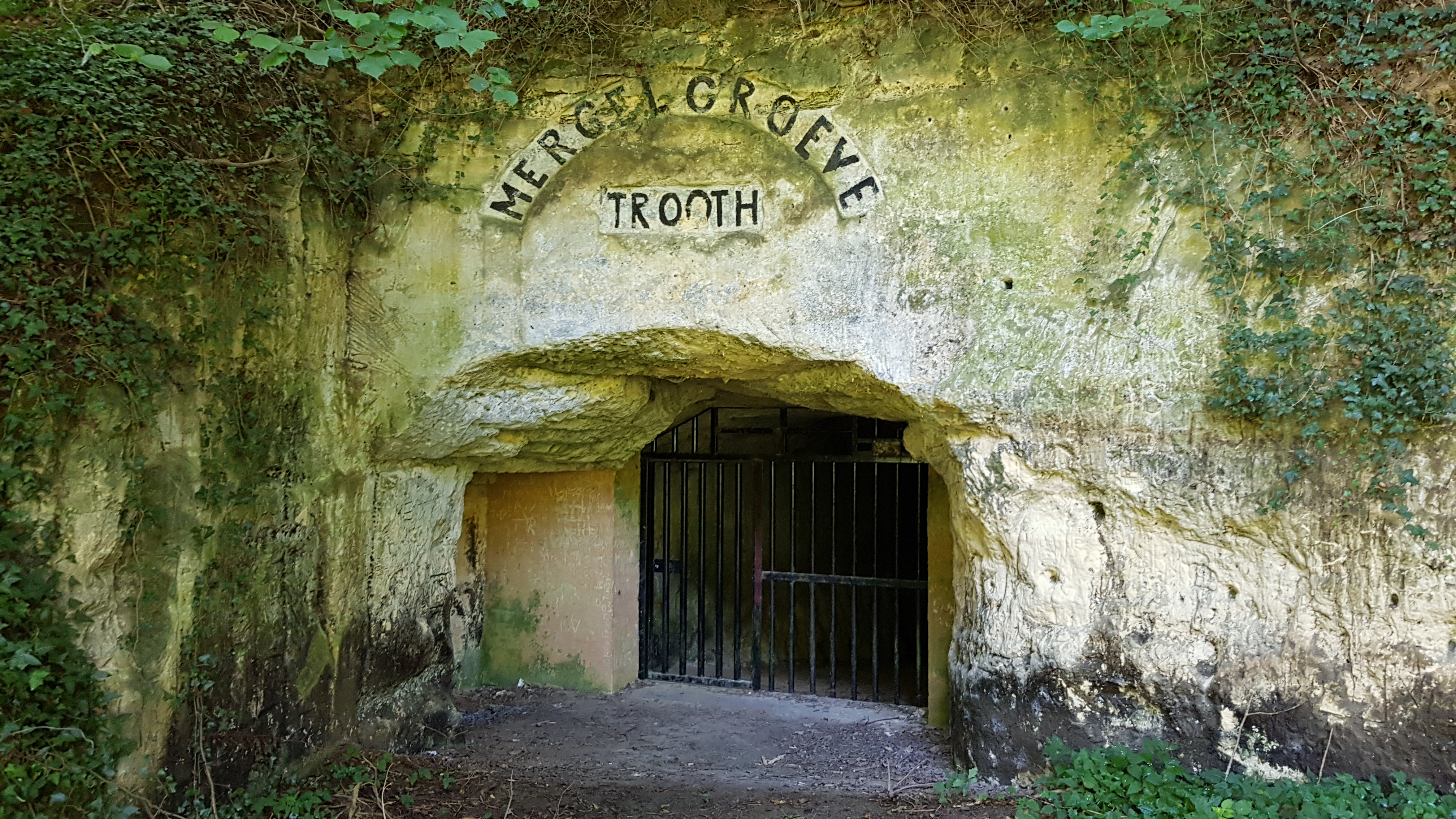 Roothergroeve, Bemelen, Nederland